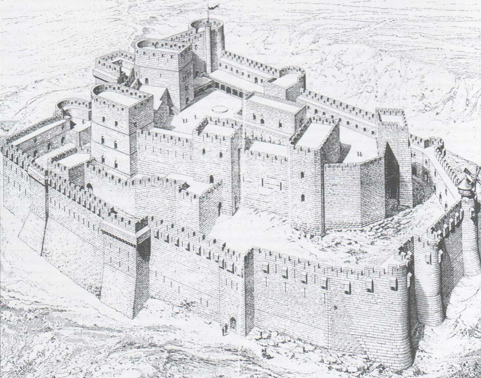 The Krak des Chevaliers as it was in the Middle-Ages. From Guillaume Rey : Étude sur les monuments de l'architecture militaire des croisés en Syrie et dans l'île de Chypre (1871).